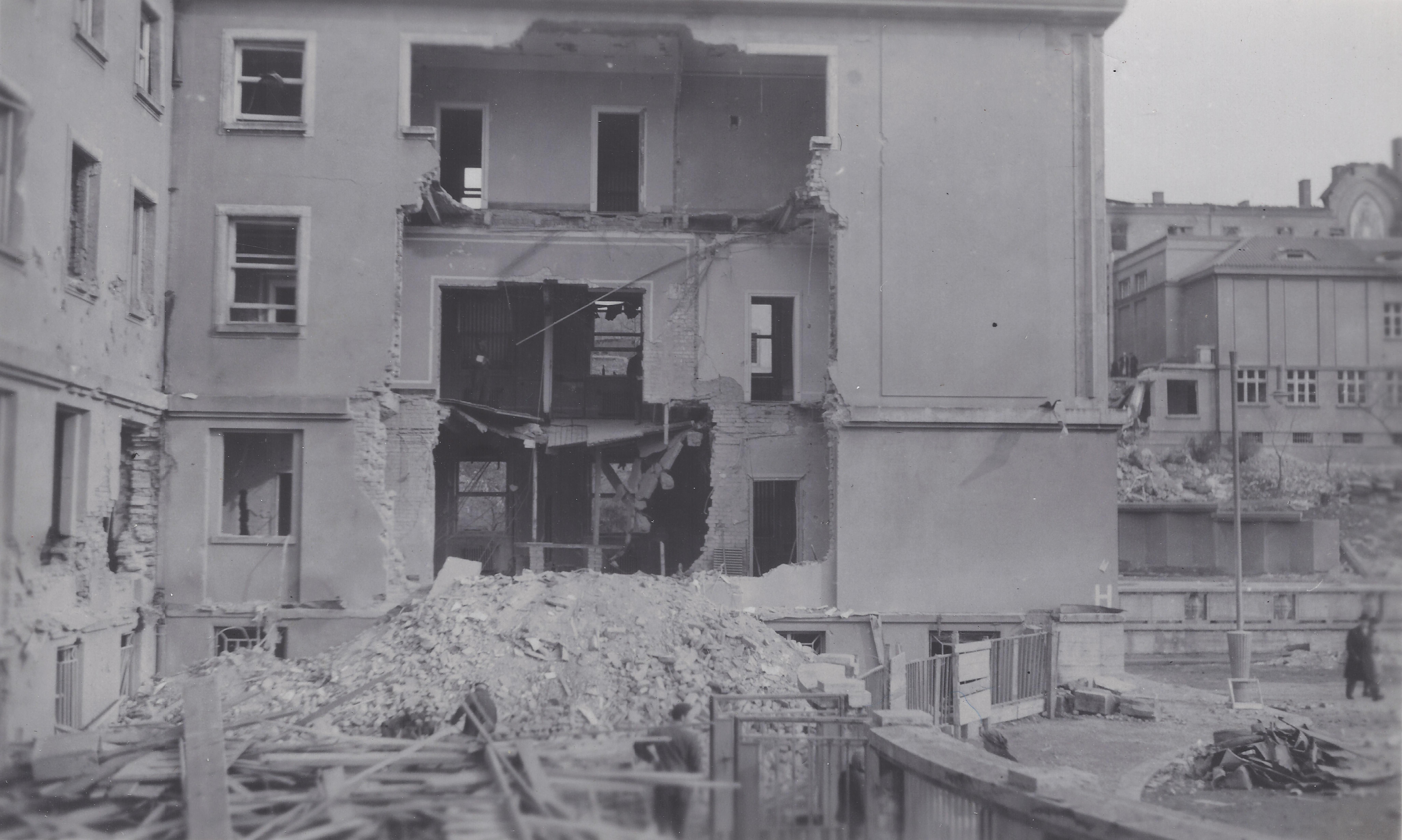 Emauzký klášter a bývalé Ministerstvo sociální péče v Praze po bombardování ze 14. 2. 1945